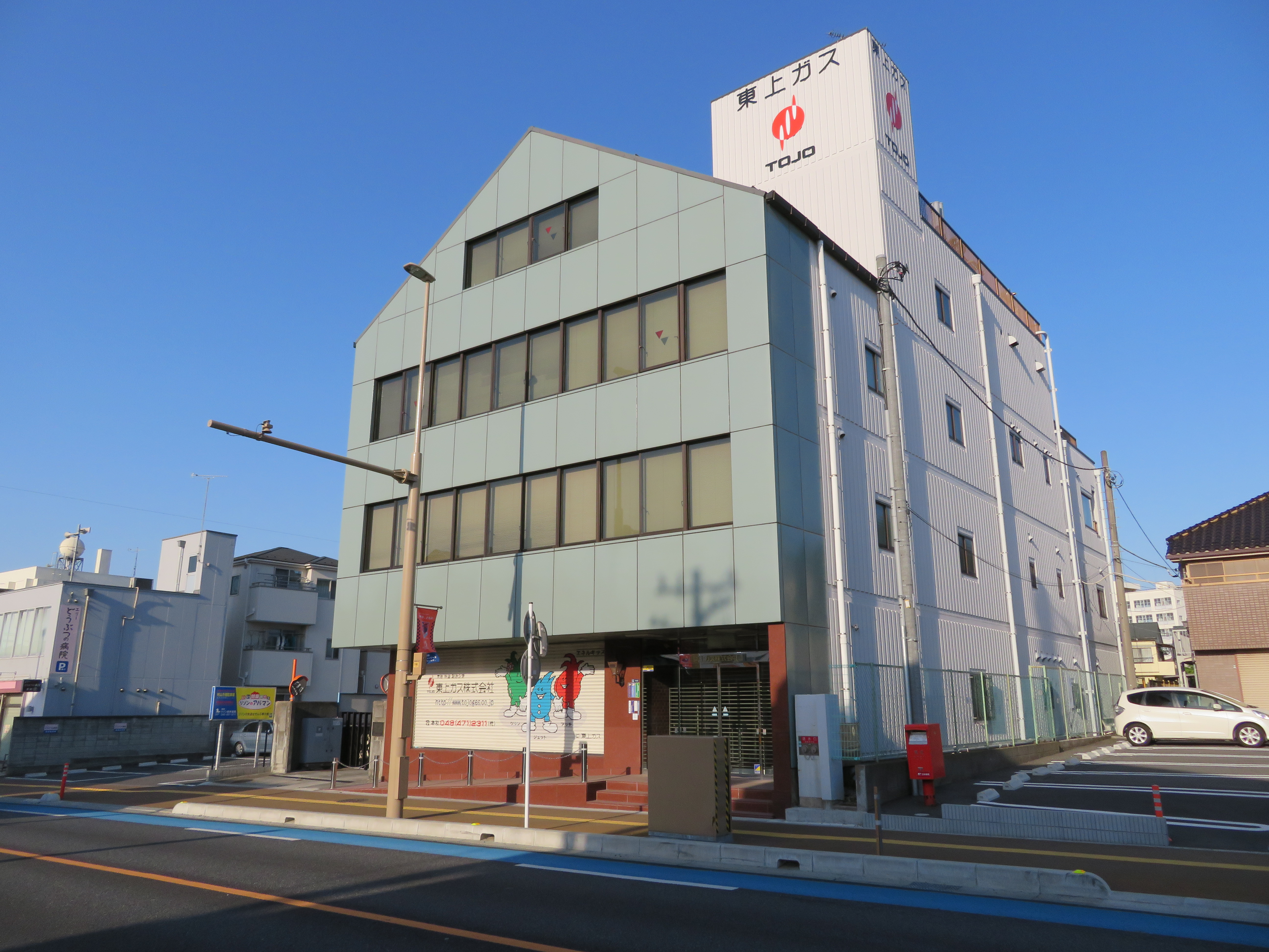 埼玉県志木市に所在する東上ガス本社 Canon PowerShot SX720 HS